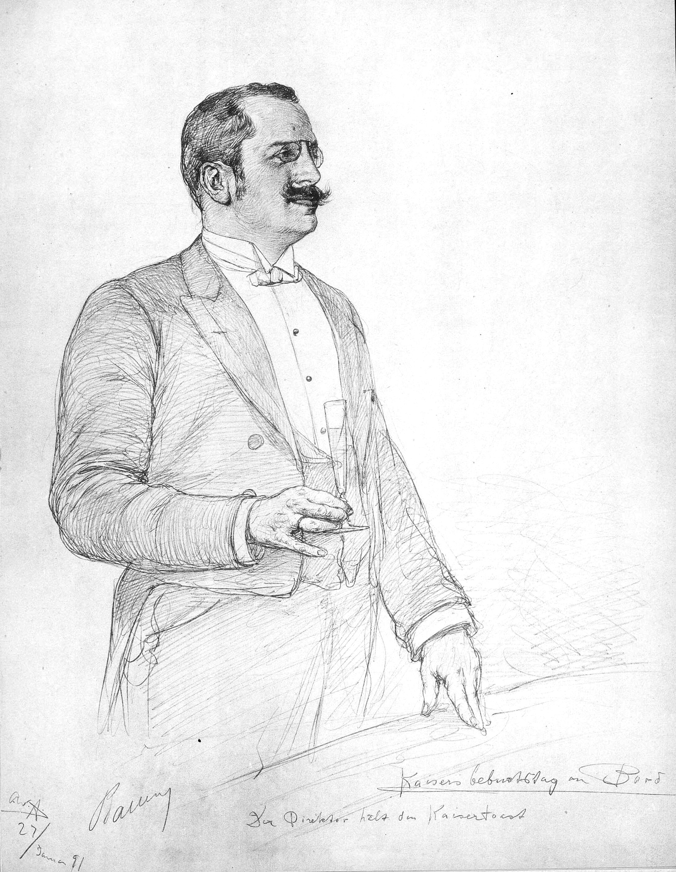 Albert Ballin, Zeichnung von C.W. Allers. Ballin ist auf der ersten Kreuzfahrt an Bord der Augusta Victoria und hält einen Toast auf des Kaisers Geburtstag. Die Zeichnung ist links unten auch von Ballin signiert.